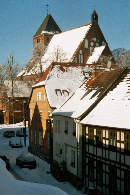 Die St.-Marien-Kirche in Penzlin, aus einem Dachfenster fotographiert. Im Vordergrund ist das östliche Ende der Turmstraße zu sehen (Landkreis Mecklenburgische Seenplatte, Mecklenburg).